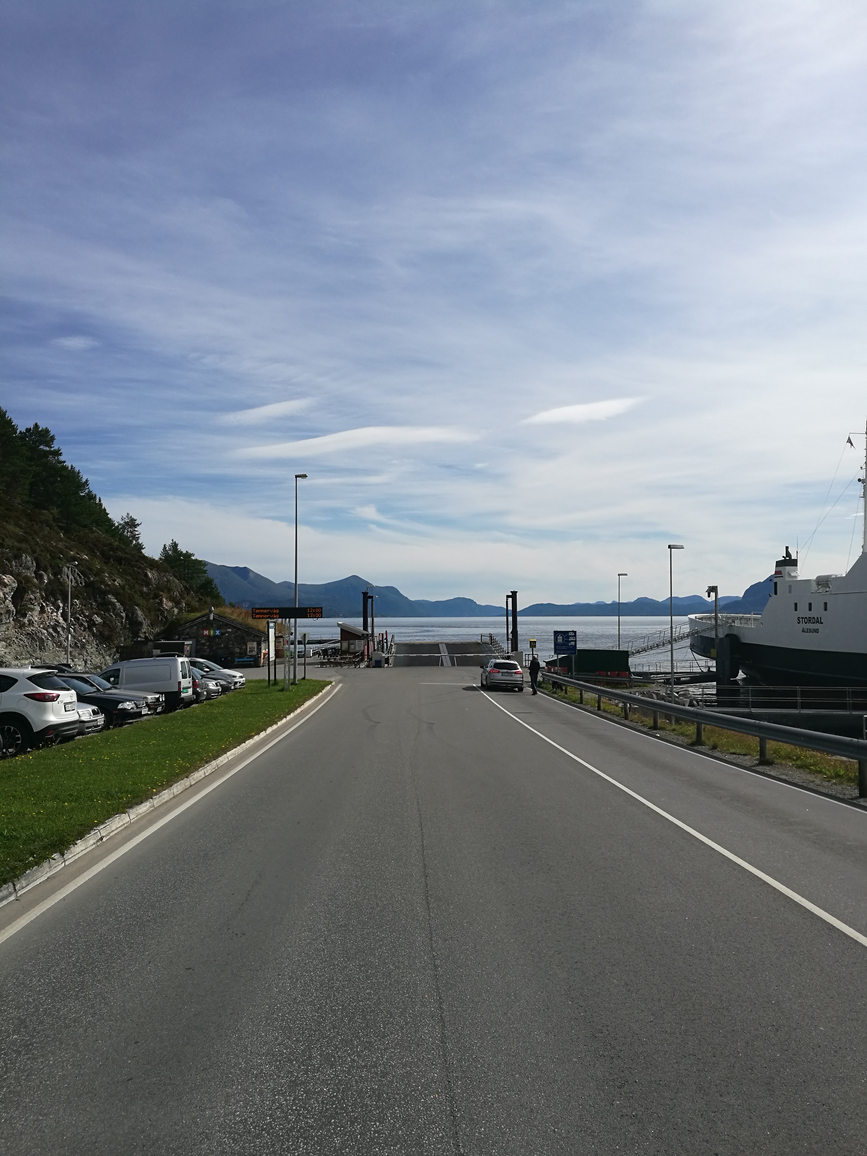 Seivika ferjekai i Kristiansund i sambandet Seivika–Tømmervåg på Fylkesvei 680.